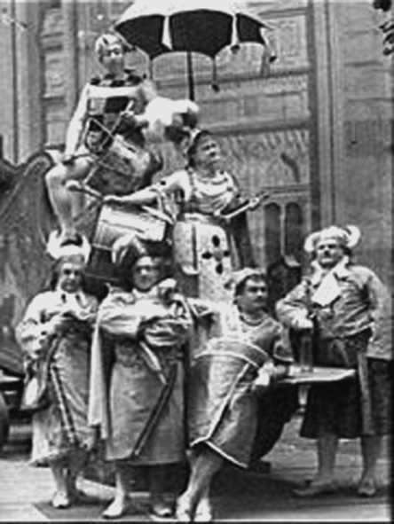 Le Voyage dans la Lune à la Gaîté (cliché Nadar)